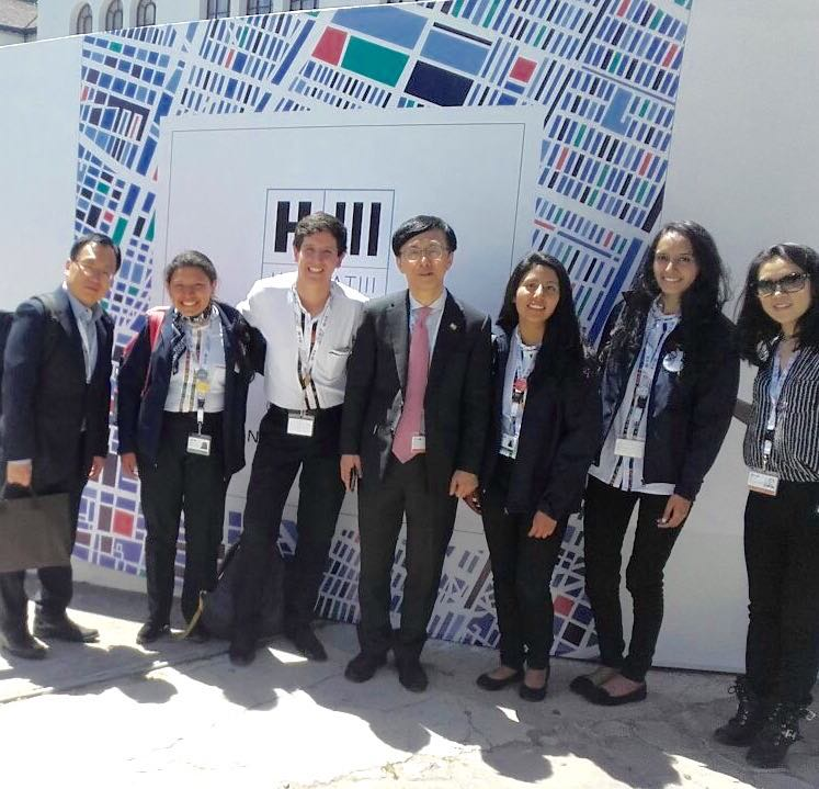 Delegación Koreana junto a voluntarios ecuatorianos en la conferencia de Naciones Unidas Habitat III